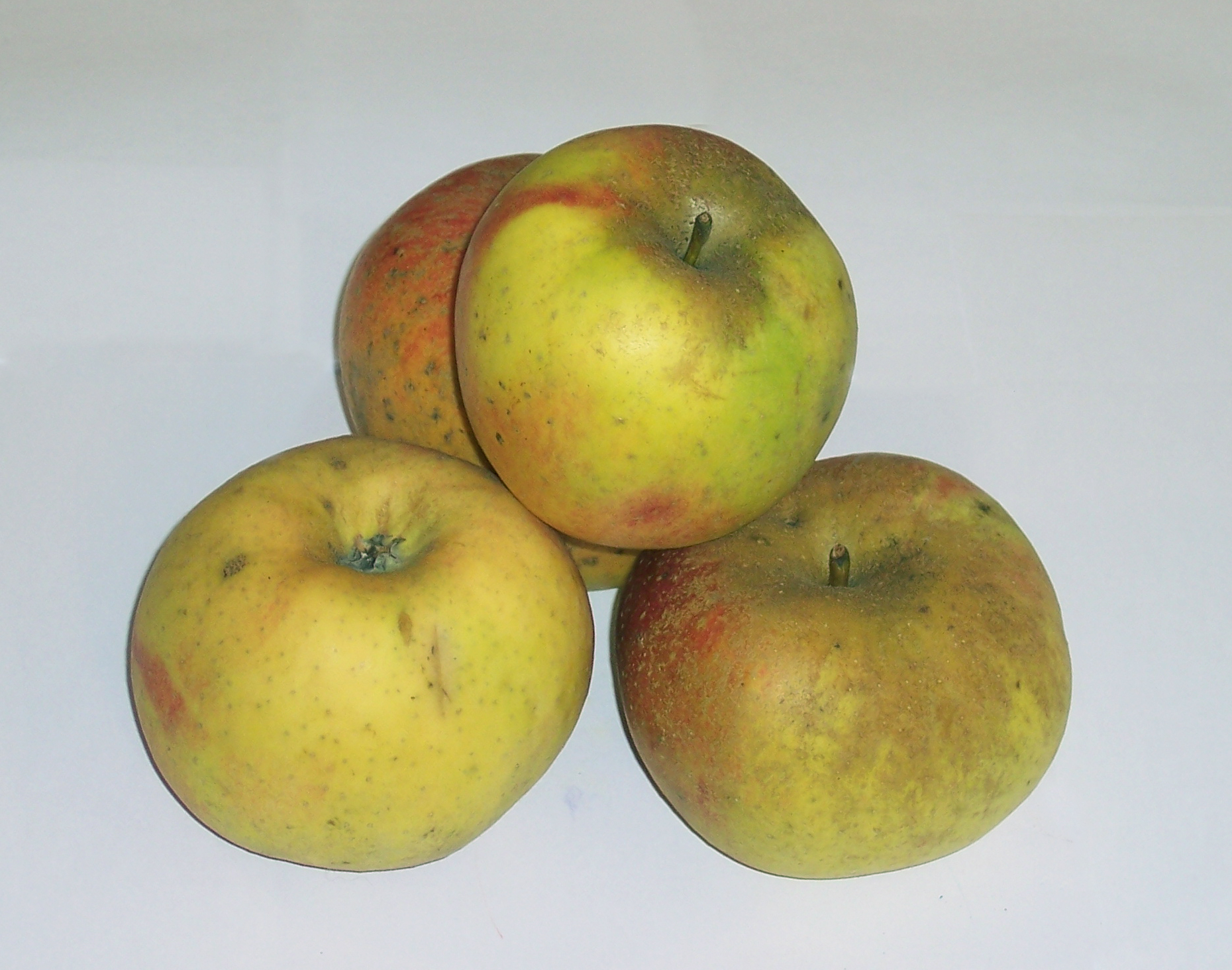 Malus Goldrenette von Blenheim